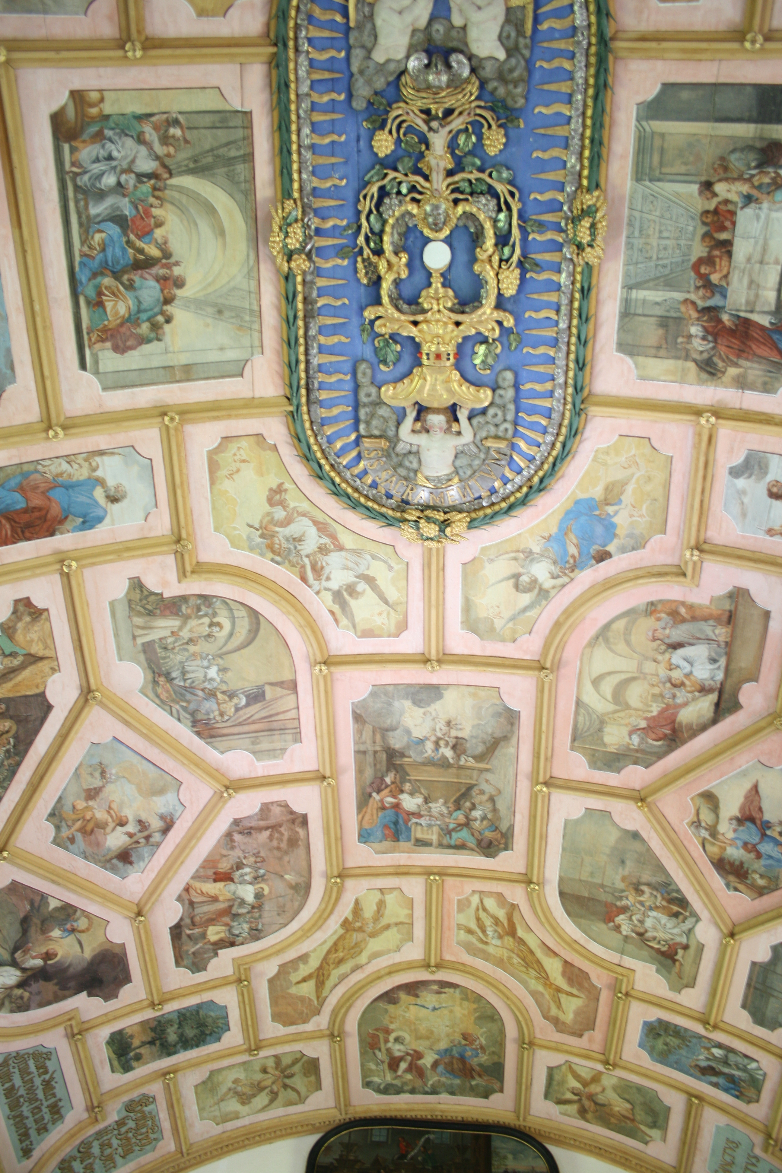 Deckengemälde in der Riedkapelle in Benningen